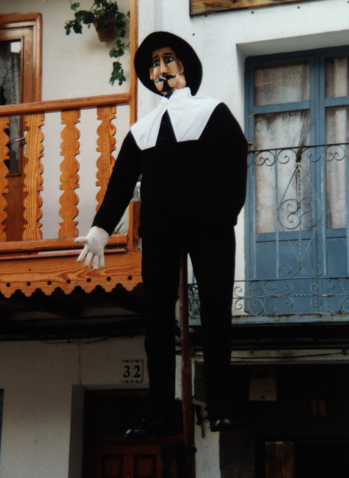 El Peropalo